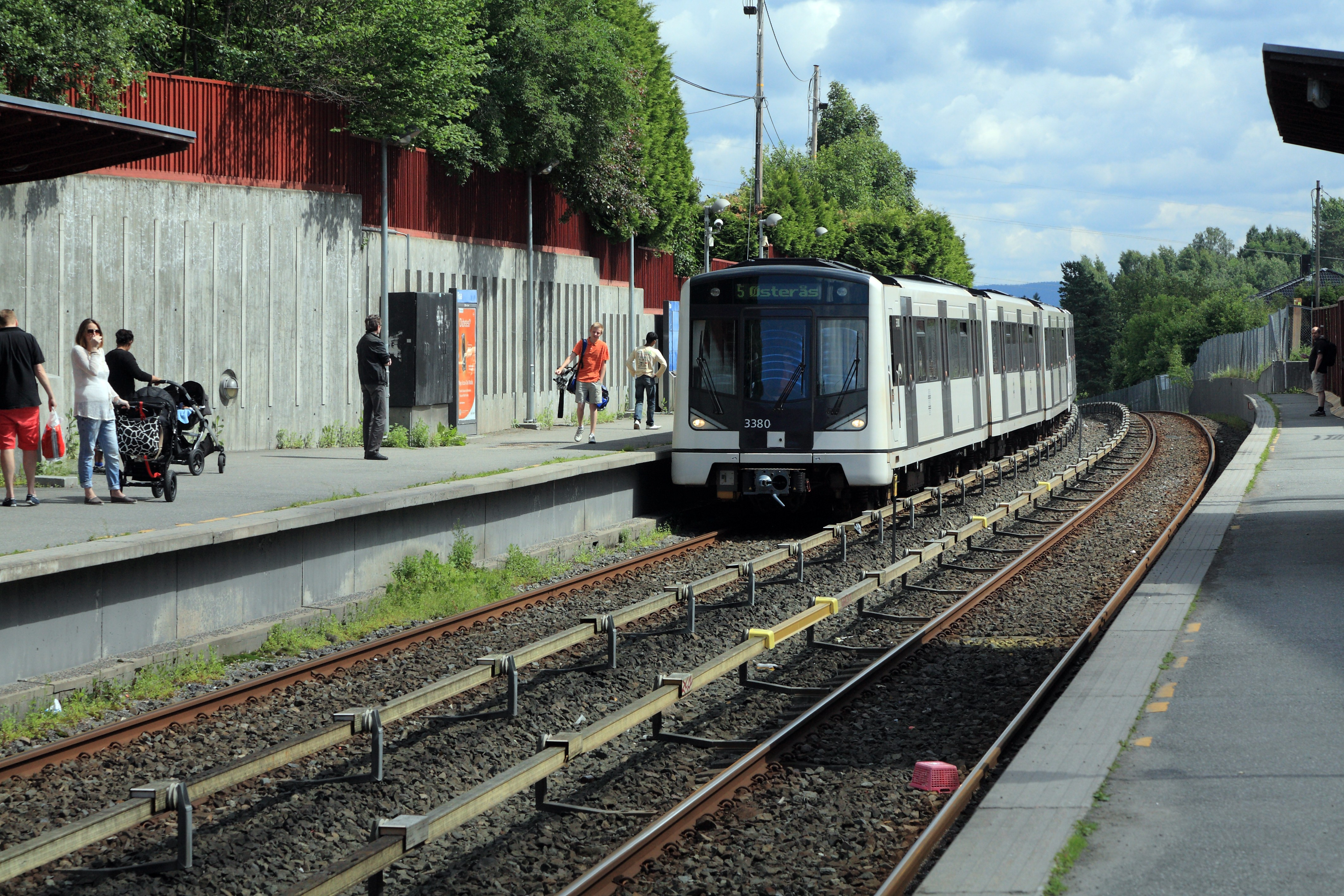 Zug der Linie 5 nach Østerås